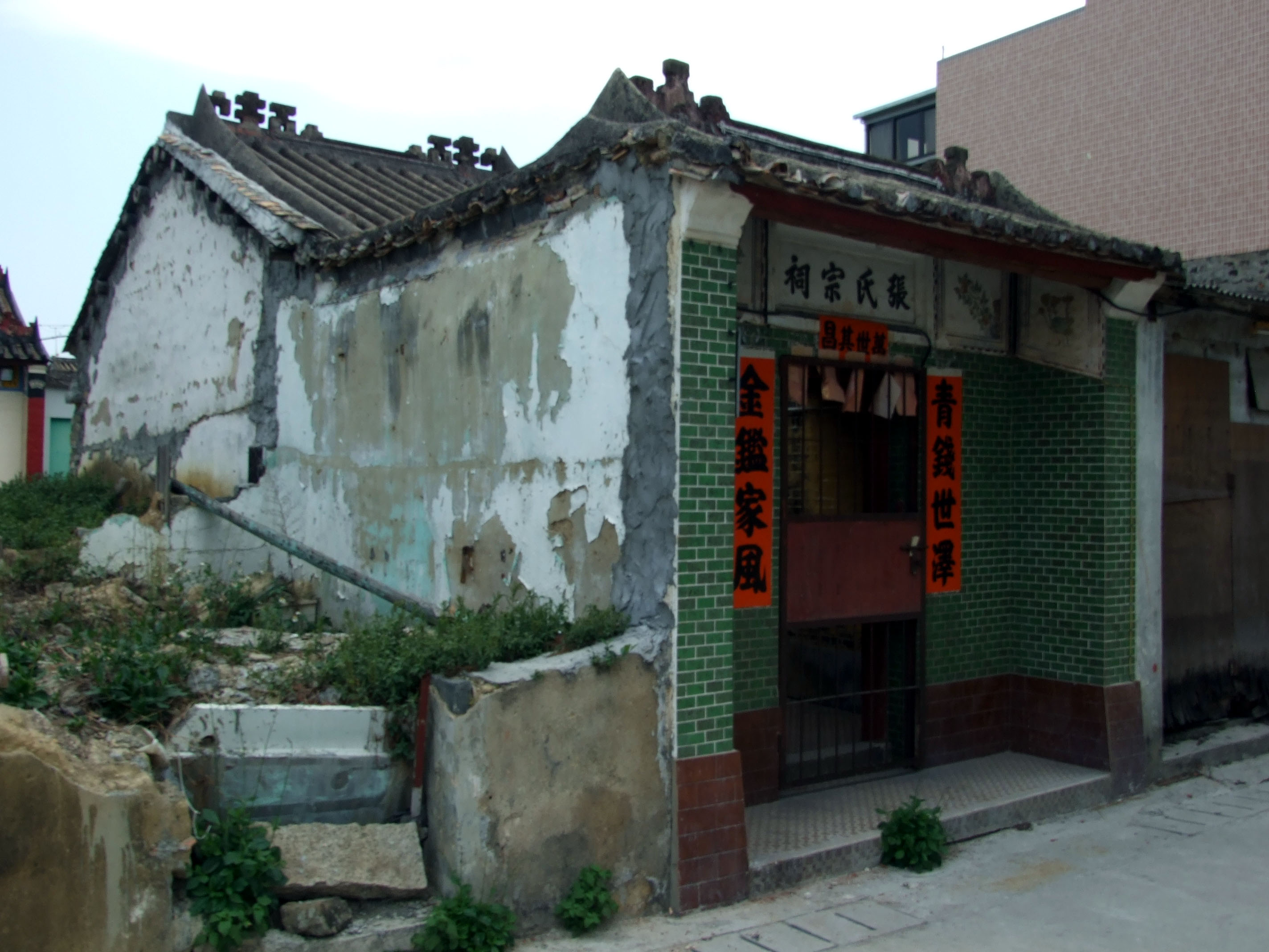 中文（香港）: 水蕉老圍張氏宗祠